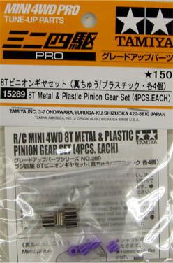 迷你四驅用齒輪組。